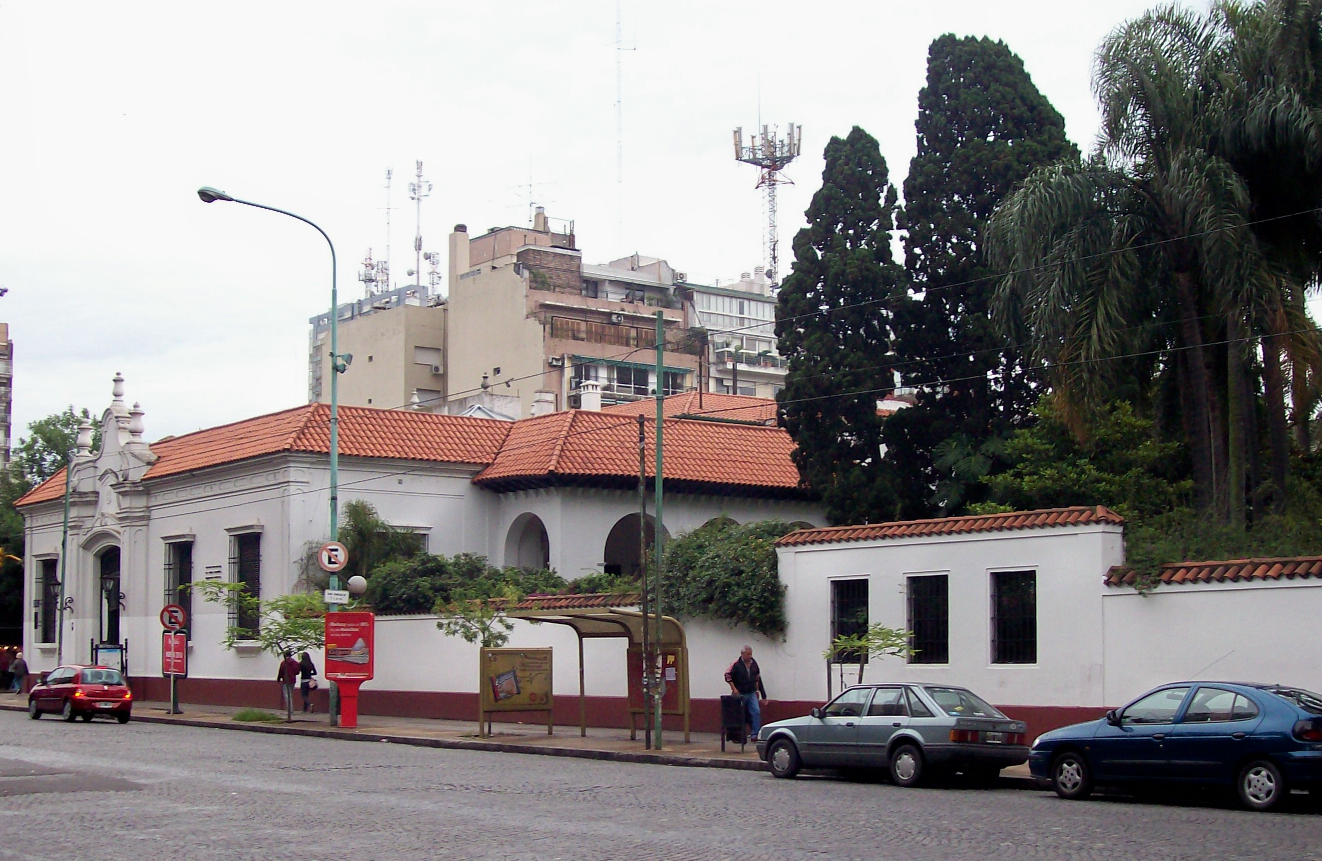 Museo de Arte Español Enrique Larreta, vista de las ventanas que dan al jardín andaluz. En Avenida Juramento, barrio de Belgrano, Buenos Aires, Argentina.